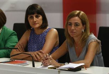 Carme Chacón et María González Veracruz lors de la première réunion de la commission exécutive fédéral issue du congrès extraordinaire de juillet 2014.